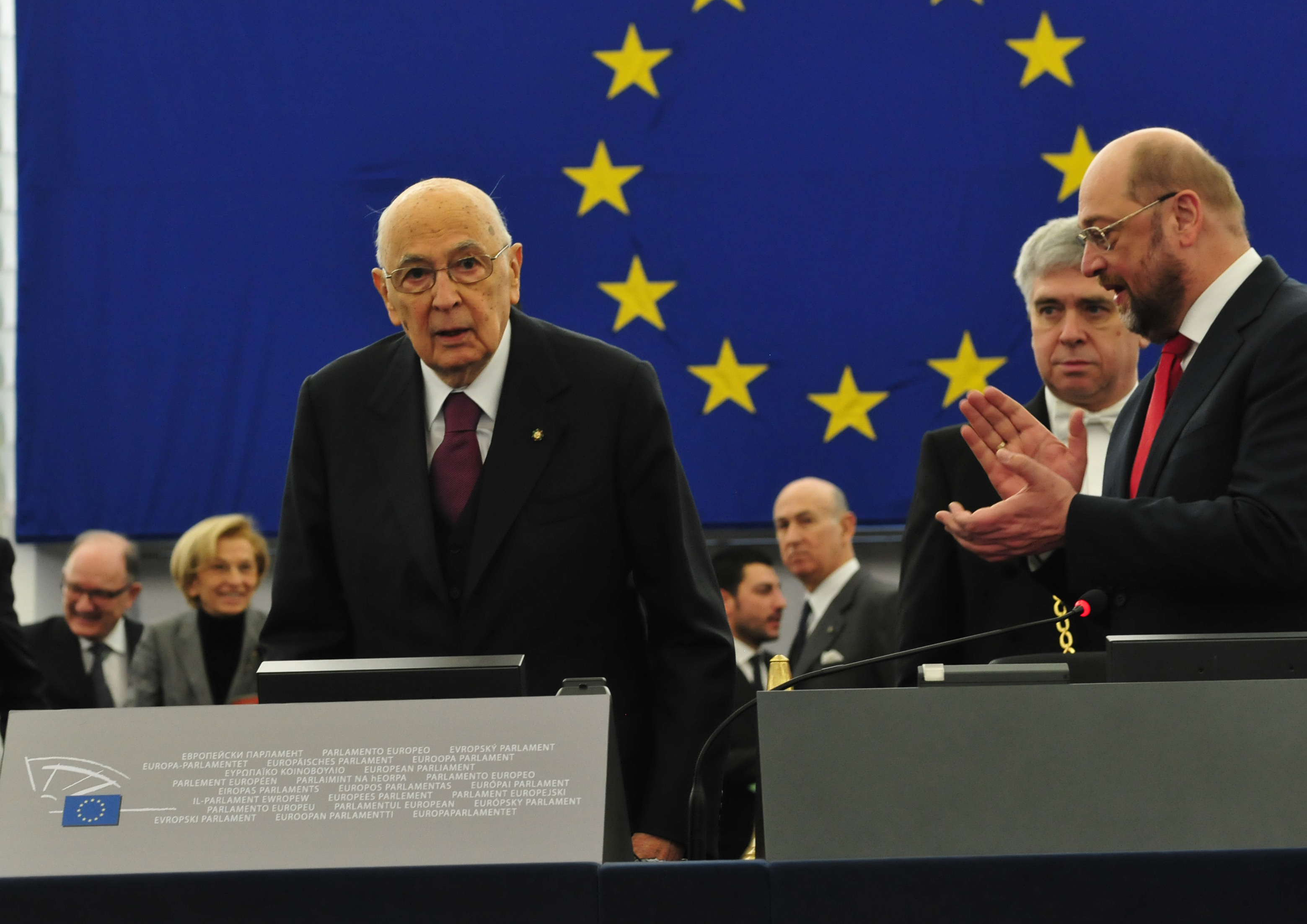 Giorgio Napolitano und Martin Schulz im Europaparlament European Parliament 2014 3.–7. February 2014, StrasbourgThis photo has been created within the project "WIKI loves parliaments / European Parliament". Usage and Help If you have any questions concerning this picture or how to use it, feel free to Personality rights warningAlthough this work is freely licensed or in the public domain, the person(s) shown may have rights that legally restrict certain re-uses unless those depicted consent to such uses. In these cases, a model release or other evidence of consent could protect you from infringement claims.